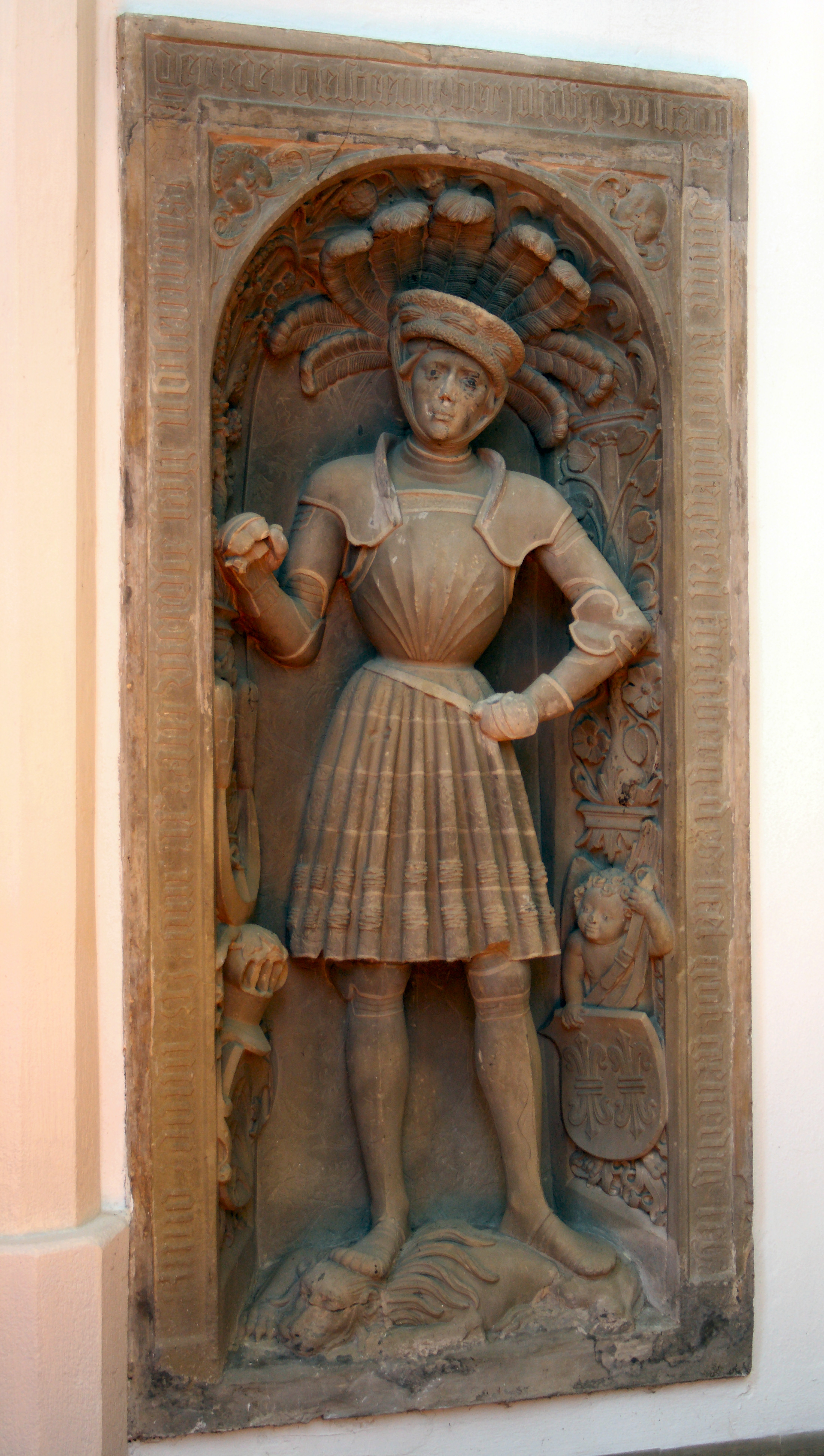 Katholische Pfarrkirche St. Martin in Jettingen, einem Ortsteil von Jettingen-Scheppach im Landkreis Günzburg (Bayern), Grabmal von Philipp von Stain